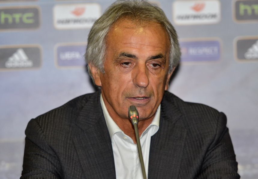 Vahid Halilhodžić, Trabzonspor'un teknik direktörü olduğu dönemde.